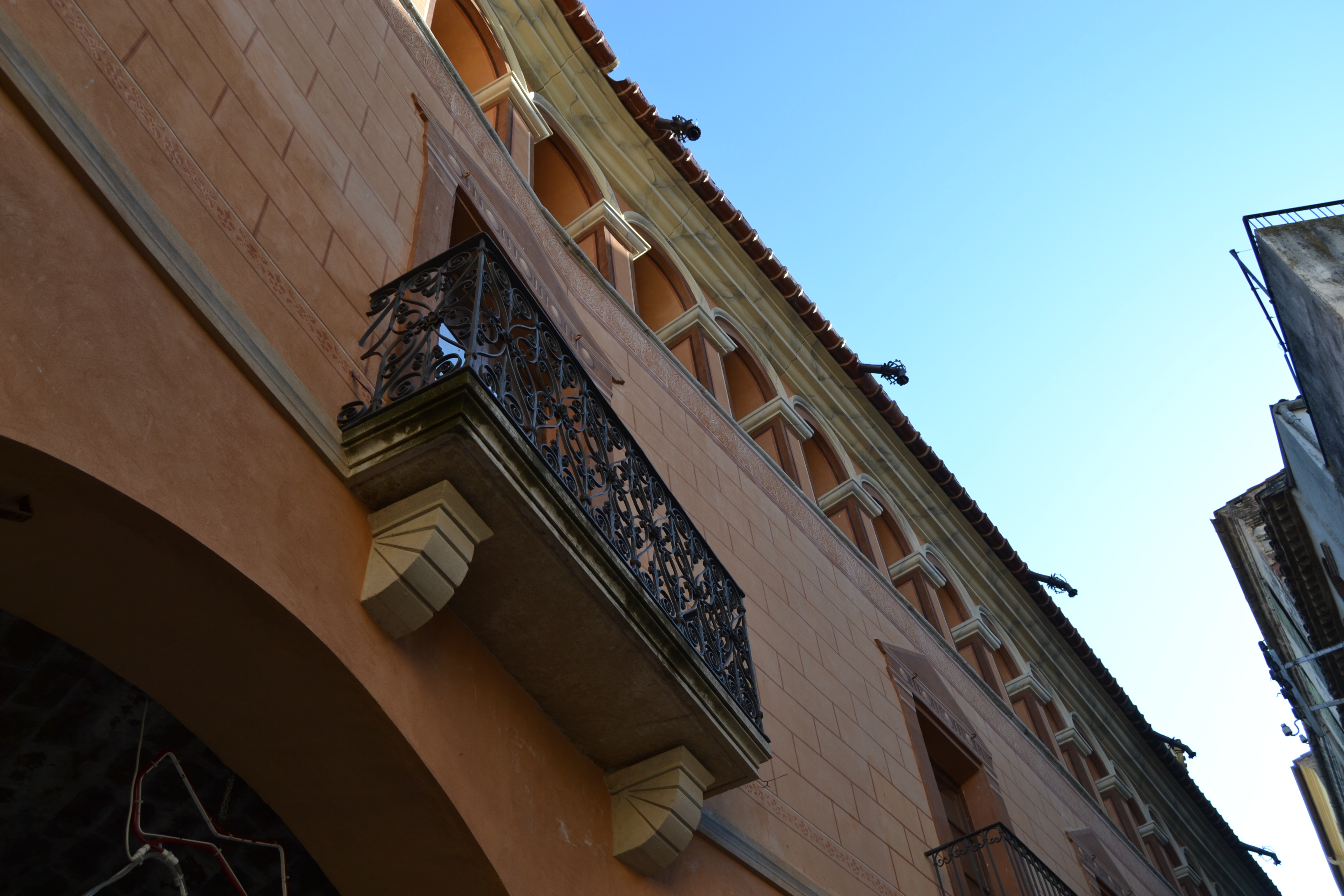 Cal Comte (Torroja del Priorat)